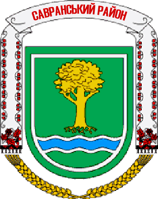 Герб Савранського району, Одеська область